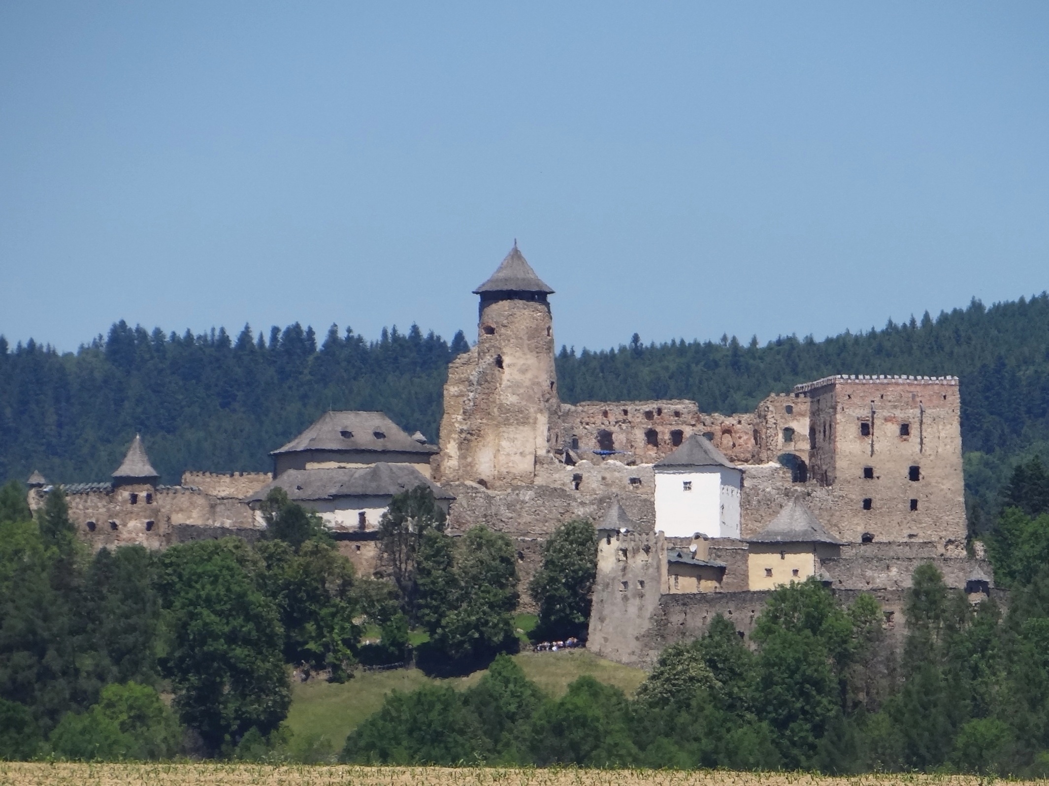 Zamek Lubowelski